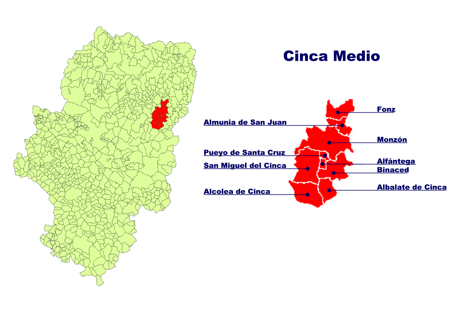 Comarca del Cinca Medio